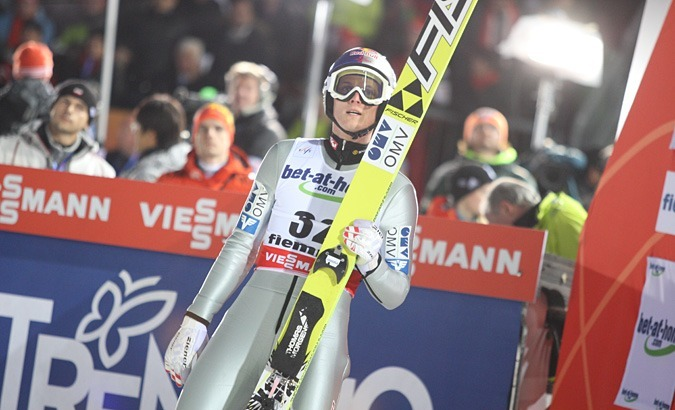 Konkurs indywidualny mężczyzn na skoczni K-120 podczas Mistrzostw Świata w Narciarstwie Klasycznym 2013